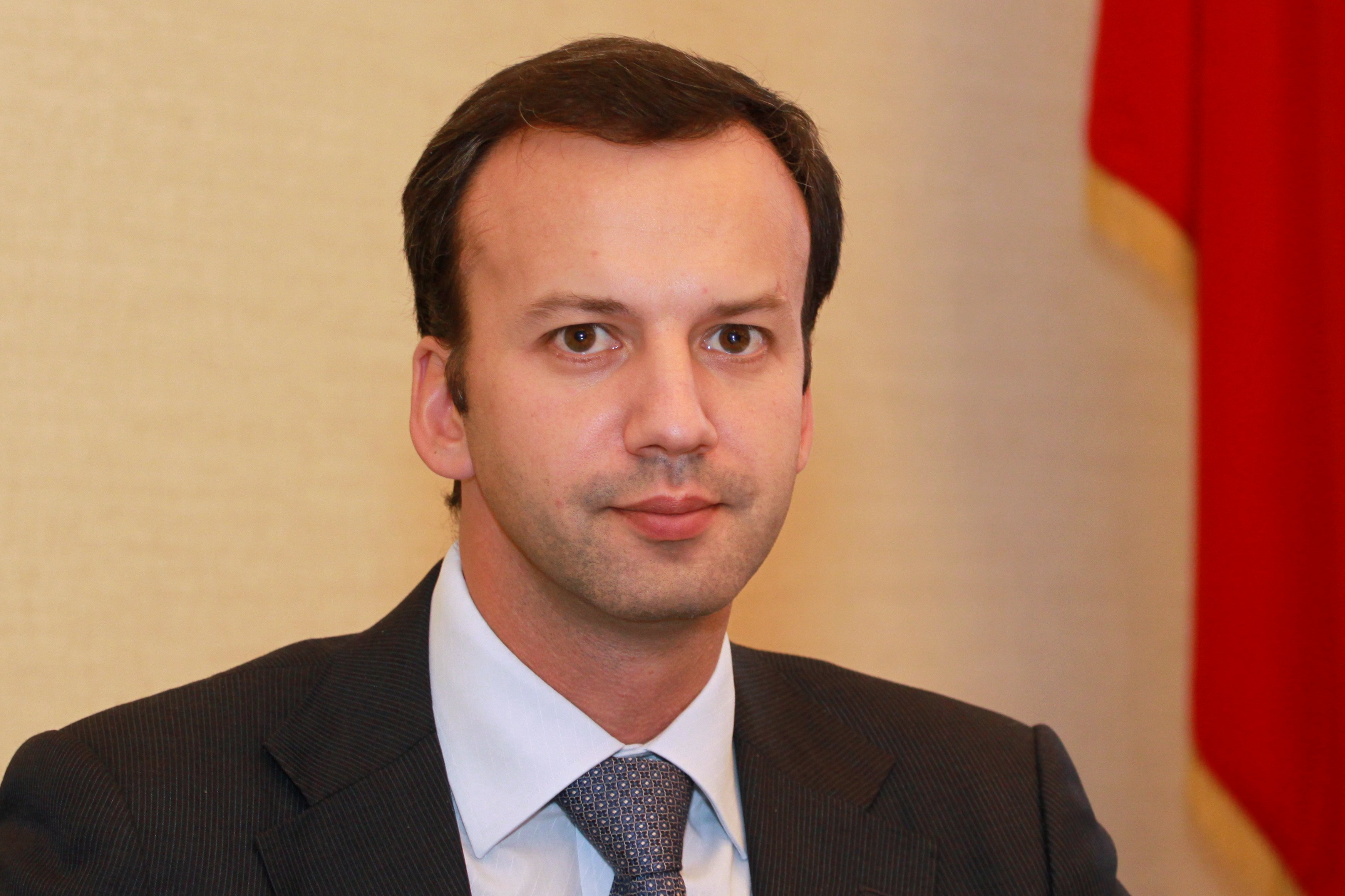 Arkadi Wladimirowitsch Dworkowitsch (russ. Аркадий Владимирович Дворкович) ist ein russischer Ökonom und seit 13. Mai 2008 persönlicher Berater des Präsidenten der Russischen Föderation, Dmitri Medwedew.